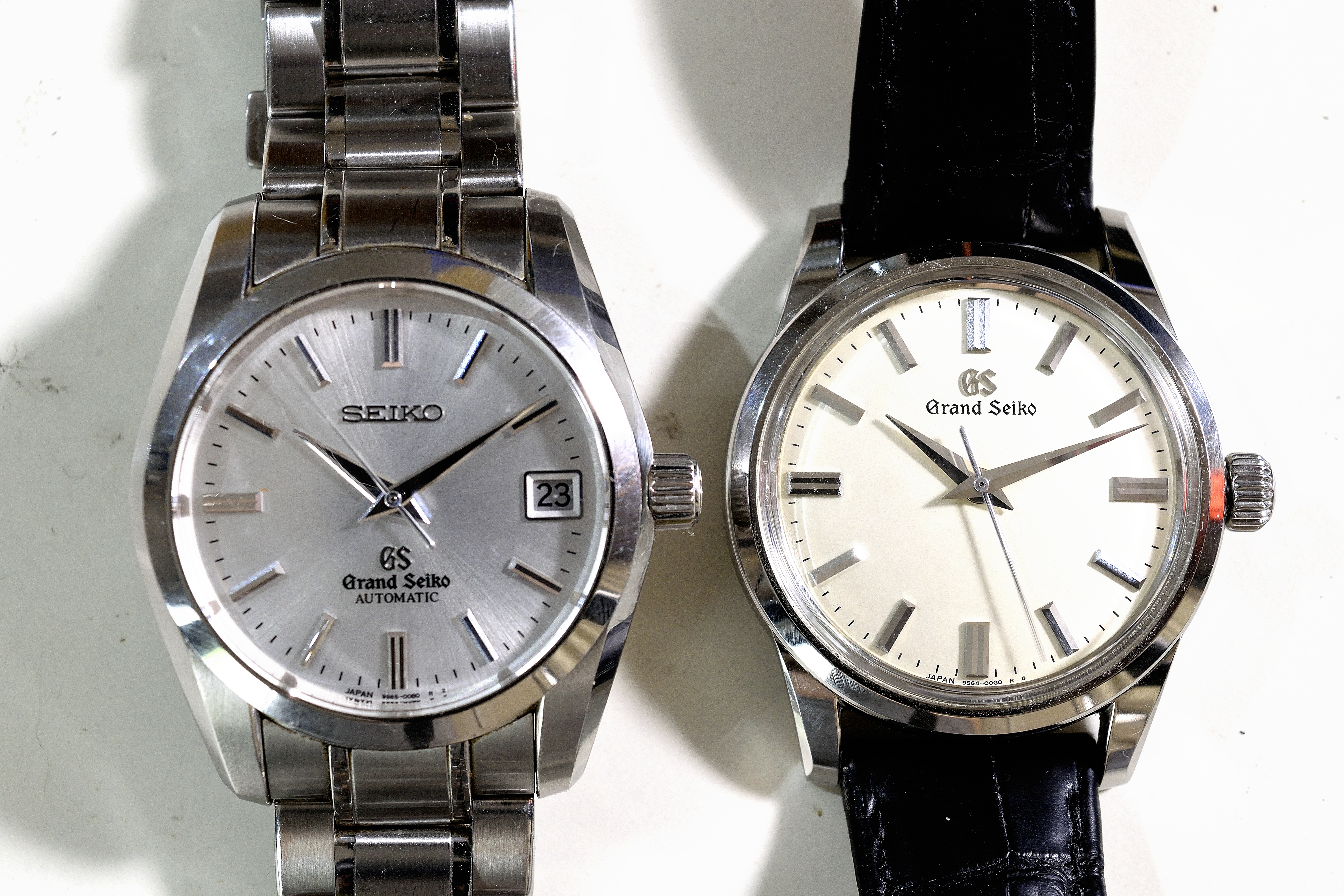 グランドセイコー 2017年以前と2017年以後のロゴの変化